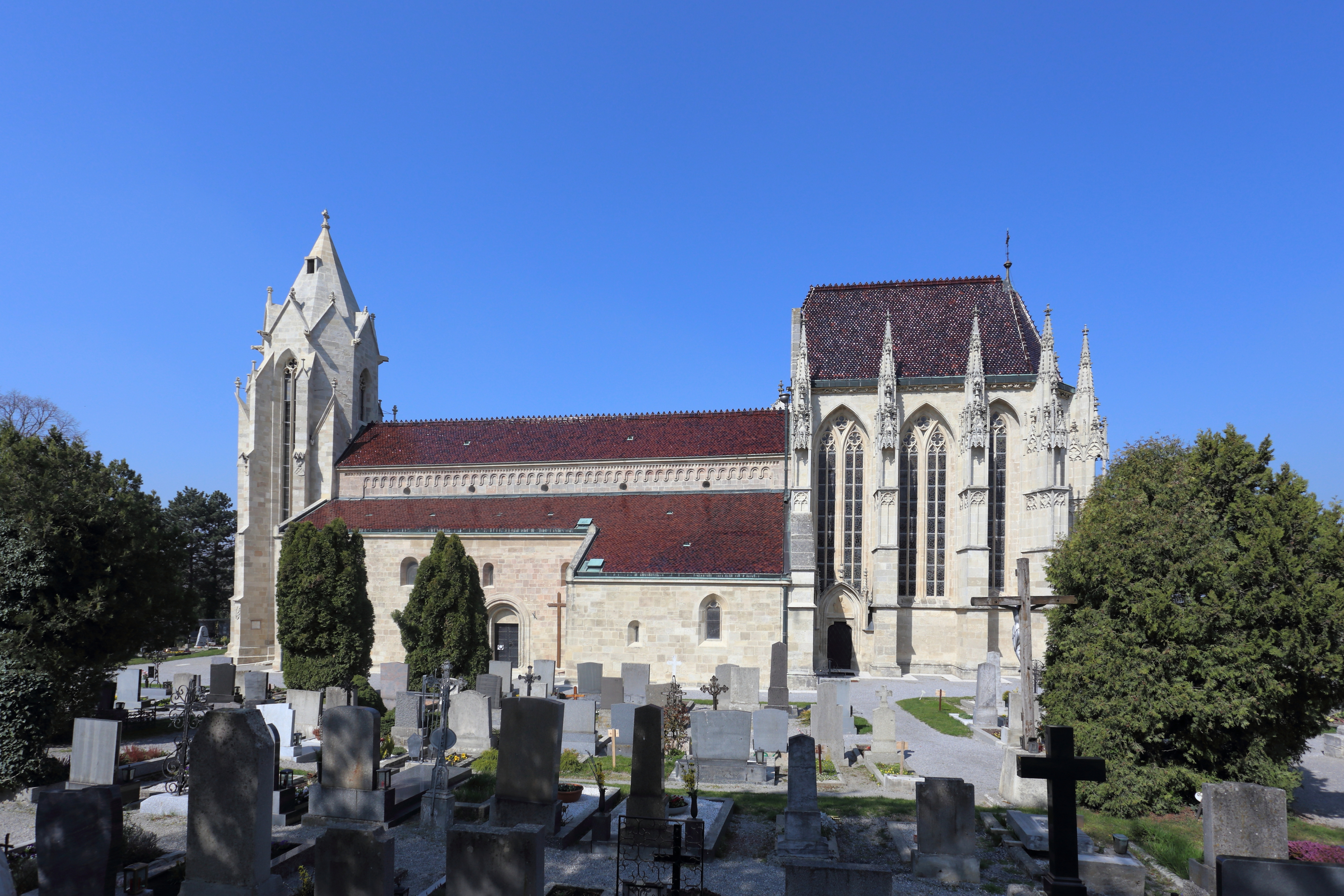 Südostansicht der Pfarr- und Wallfahrtskirche Mariae Himmelfahrt in der niederösterreichischen Marktgemeinde Bad Deutsch-Altenburg. Die Kirche wurde erhöht über dem Ort auf einer zur Donau steil abfallenden Terrasse errichtet und ist vom Friedhof und einer Umfassungsmauer aus Bruchsteinen umgeben. Das Langhaus ist eine romanische, dreischiffige und sechsjochige Pfeilerbasilika. Der vorgestellte hochgotische Turm im Westen stammt aus dem 3. Viertel des 14. Jahrhunderts. Der erhöhte, zweijochige gotische Chor wurde vermutlich vom Baumeister Michael Knab Ende des 14. Jahrhunderts errichtet. Insgesamt ist das Bauwerk ein bedeutendes Denkmal mittelalterlicher Architektur in Österreich.